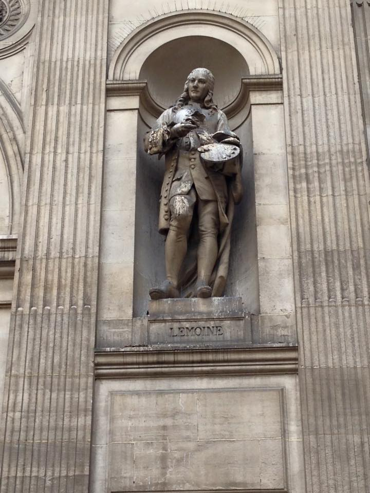 Paul-Armand Bayard de La Vingtrie, François Lemoyne, Paris, Hôtel de Ville